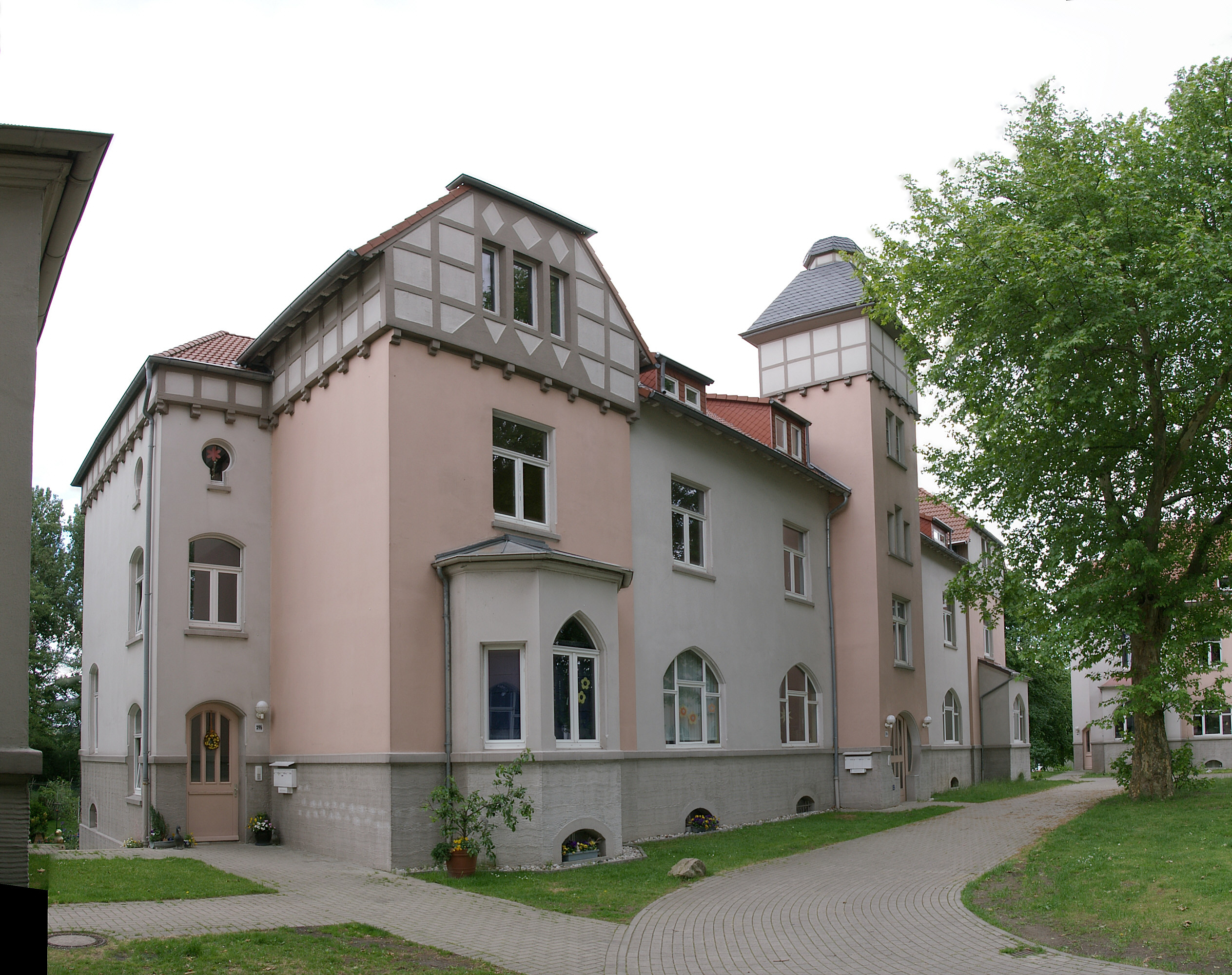 Bergbeamtenwohnung in der Müsersiedlung, erbaut etwa 1903, Dortmund-Derne, Nordrhein-Westfalen